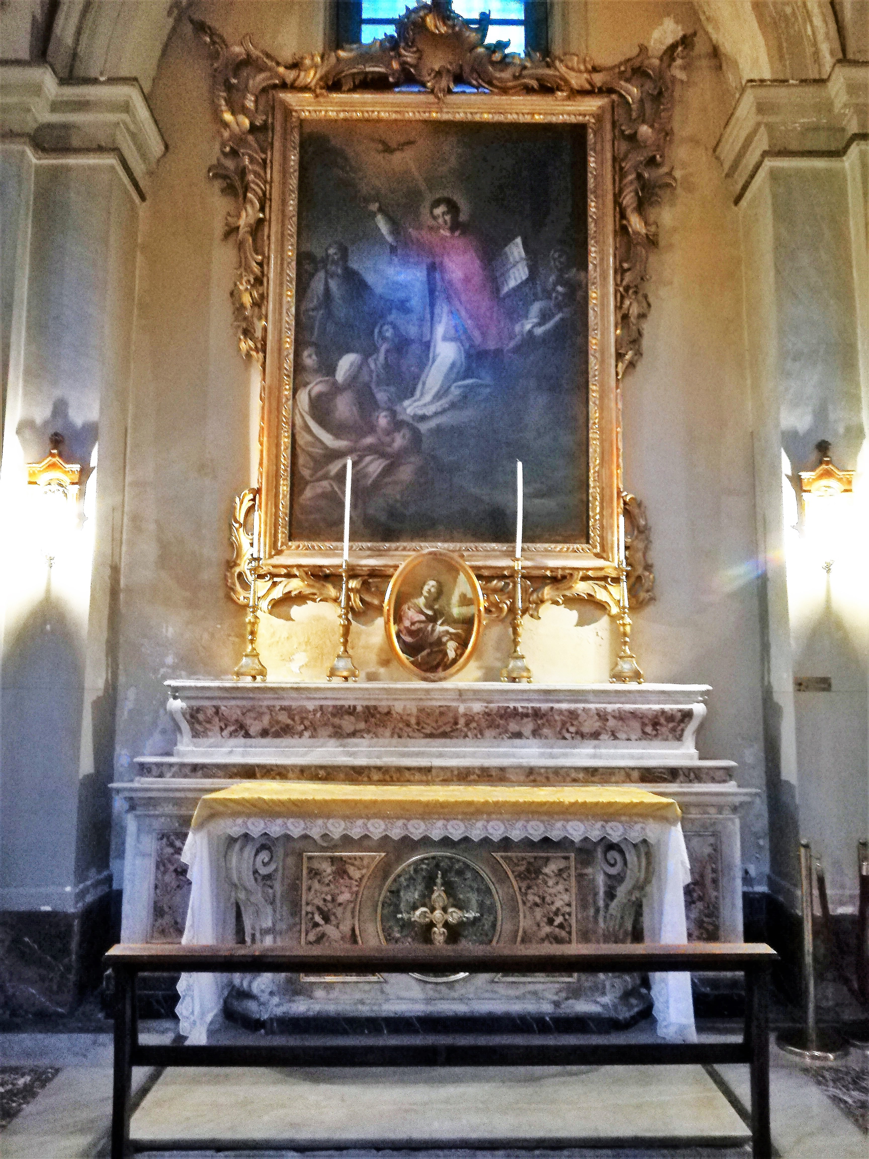 Cappella di San Euplio. San Euplio, opera di Olivio Sozzi.